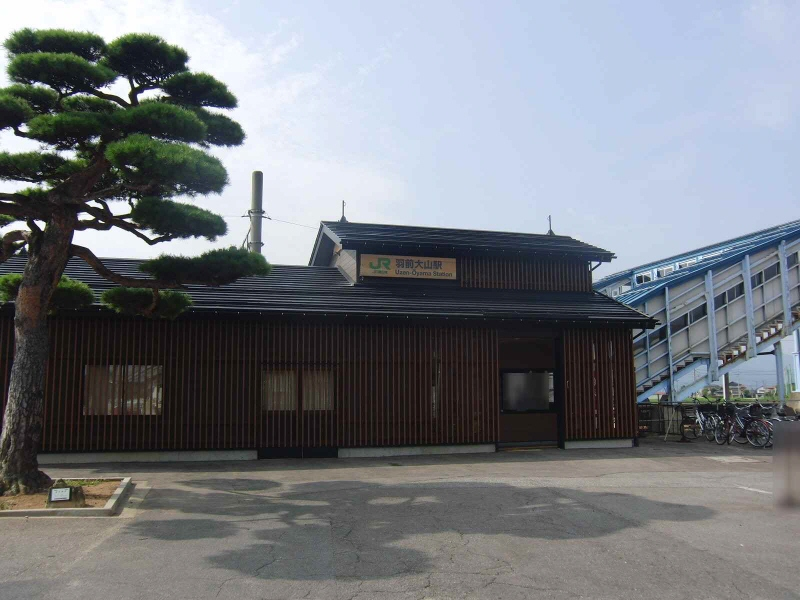 羽前大山駅の駅舎です。